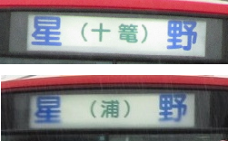 星野村方面の方向幕二種類